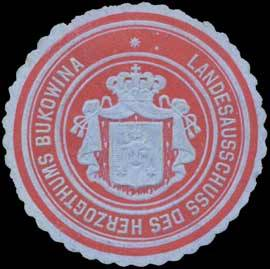 Sealing stamp Title: Landesausschuss des Herzogthums Bukowina Description: rotbraun, hellblau, geprägt Place: Czernowitz/Ukraine size: 4 cm